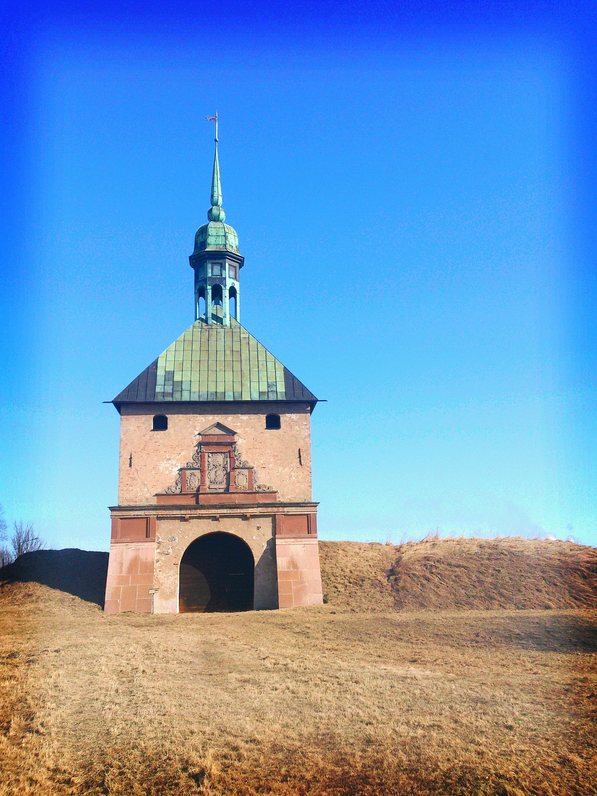 Johannisborgs slottsruin Norrköping